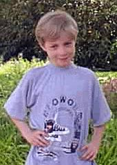 Andreas Strunski, 2001 bei der Stuttgarter Stadtmeisterschaft im Schach.